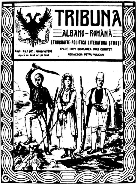 Трибуна Албано-Романа